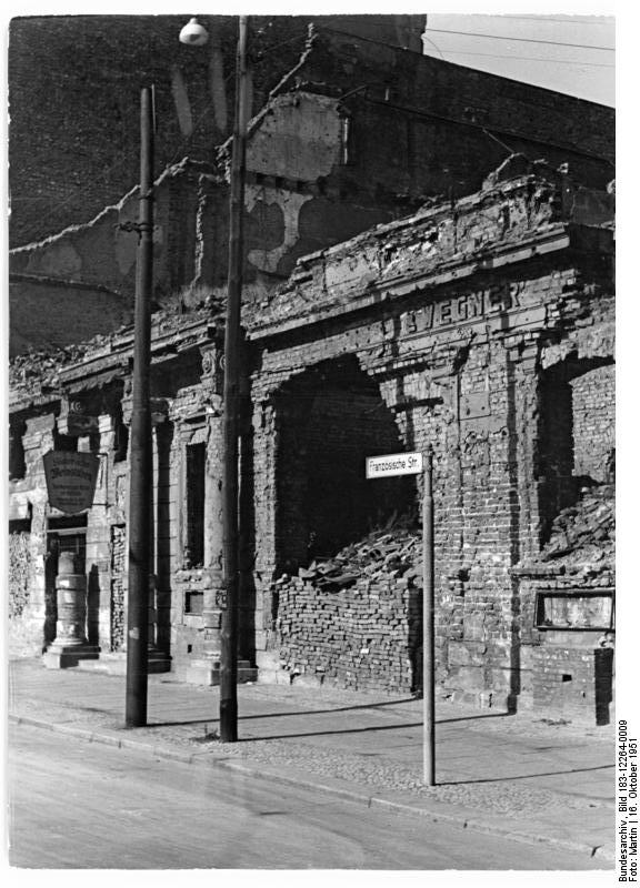 Berlin, Französische Straße, Weinkeller, Ruine Alte Kulturbauten werden wieder aufgebaut. Viele Kulturbauten, die untrennbar mit der Geschichte Berlins verbunden sind, wurden während des Hitlerkrieges zerstört oder beschädigt. Ausser anderen lebenswichtigen Bauvorhaben des demokratischen Magistrats werden auch diese alten Kulturbauten wieder restauriert und der Nachwelt erhalten. UBz: Auch das romantische Weinstübchen Lutter & Wegener, der E.T.A. Hoffmann- Keller in der Französischen Straße wird wieder eingerichtet. Illus Martin 16.10.51